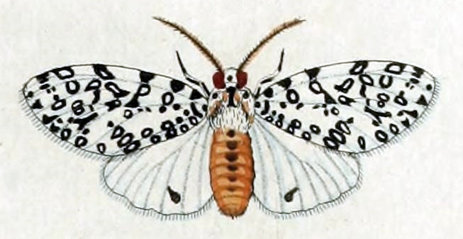 Alpenus maculosus